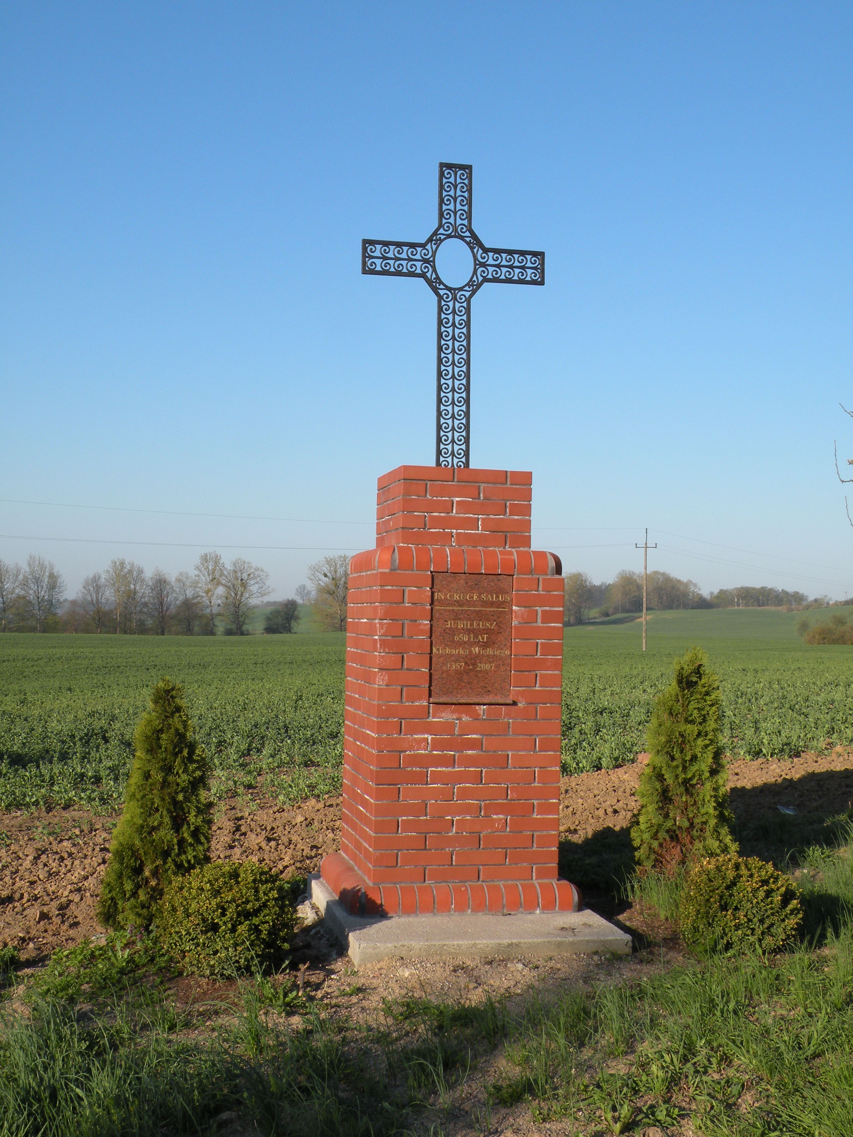 Krzyż upamiętniajacy jubileusz wsi, Klebark Wielki